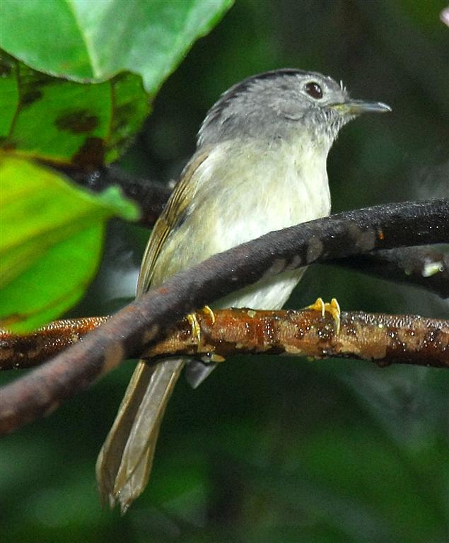 Mountain Fulvetta (Alcippe peracensis)